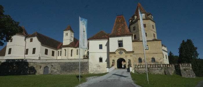 Schloss Kornberg bei Feldbach (Steiermark)